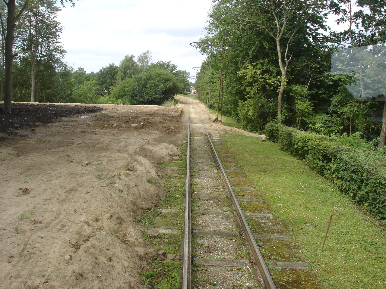 Ringsted-Hvalsø-Frederikssund-banens tracé med Sporvejsmuseets skinner